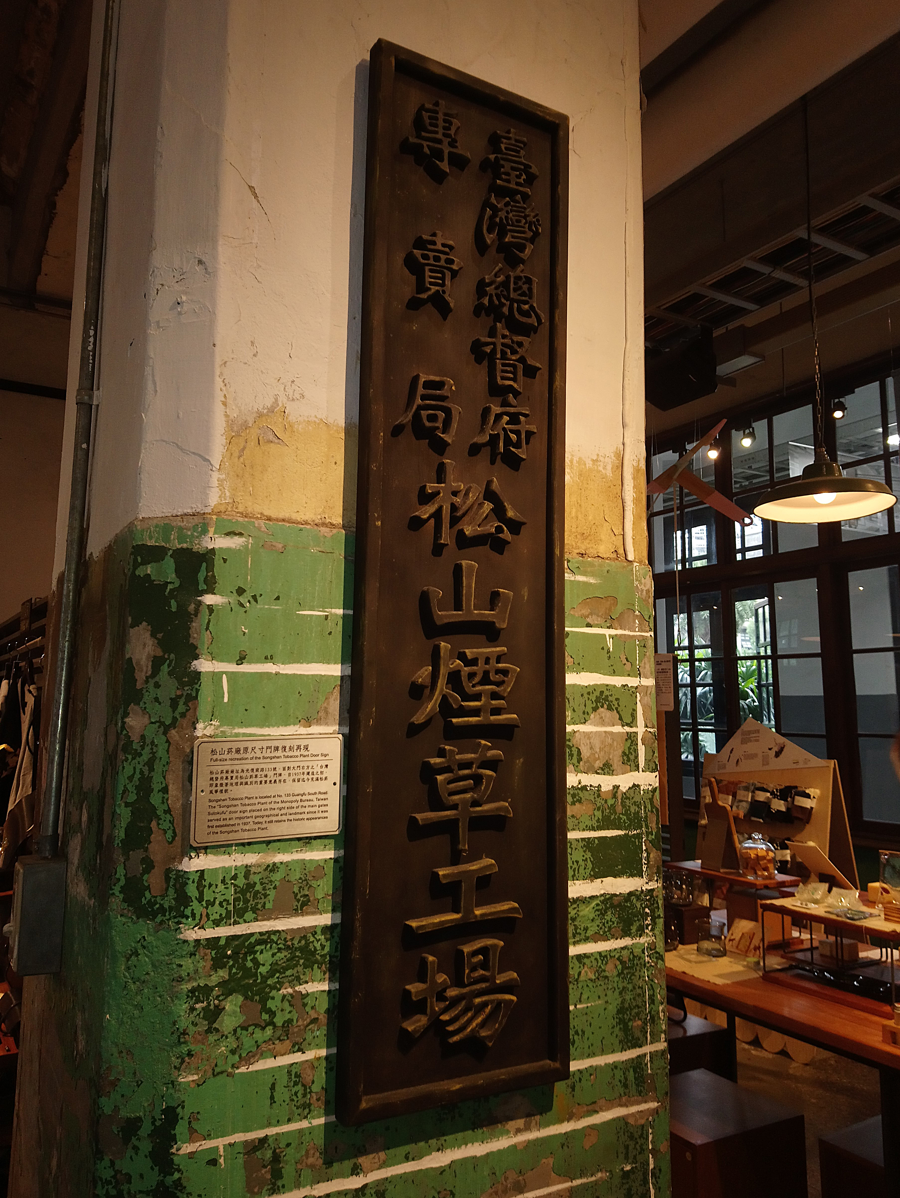 松山文化創意園區製菸工場一樓松菸小賣所，「臺灣總督府專賣局松山煙草工場」門牌復刻版。